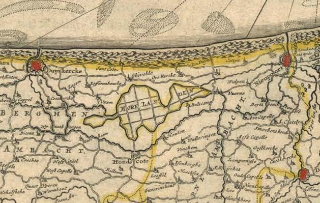 Kaartfragment van Blaeu 1645 Vlaanderen met De Moeren